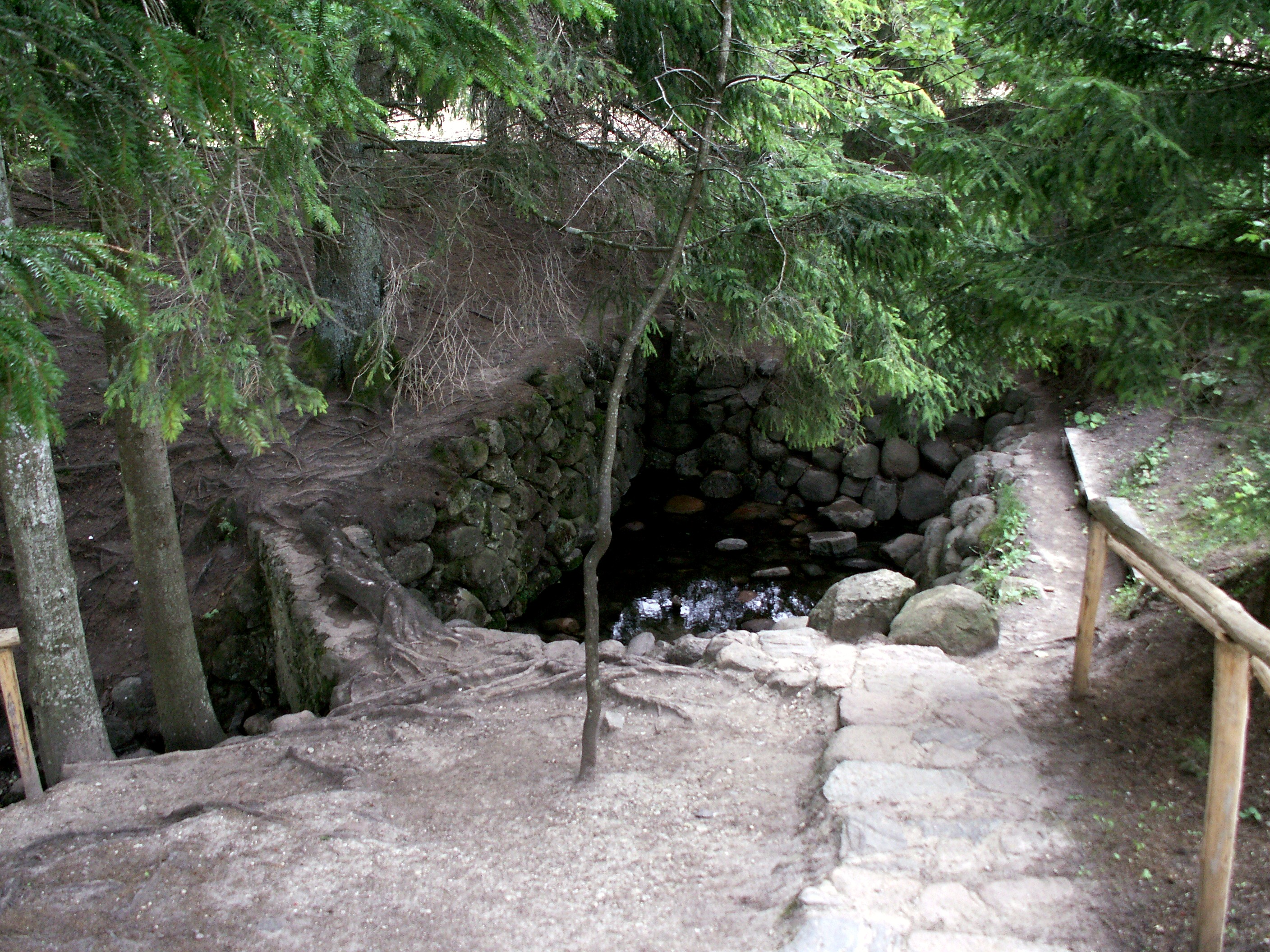 Kevelės šaltiniai, Vytinių pagastas, Latvija